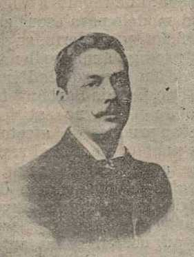 José Lombardero Franco, 1904